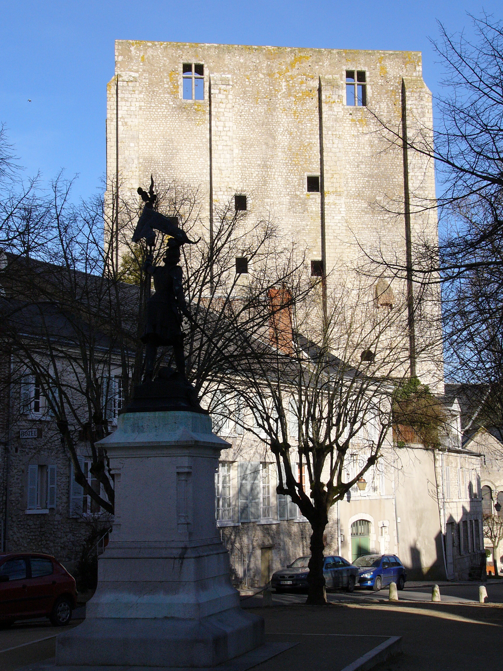 Beaugency (Loiret, France) : le donjon ; au premier plan, statue de Jeanne d'Arc